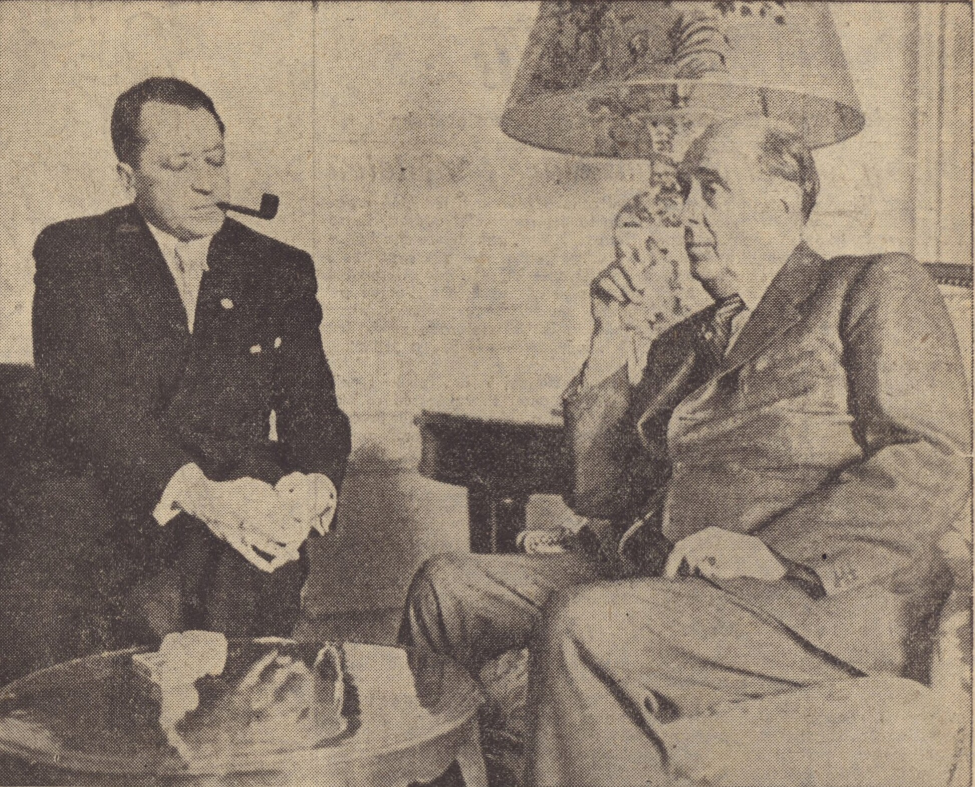 Vladimír Clementis a Jan Masaryk v roce 1946 po Pařížské mírové konferenci .